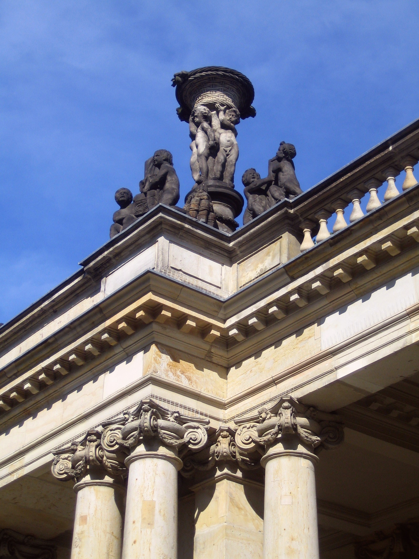 Die Königskolonnaden als Zugang zum Heinrich von Kleist-Park in Berlin-Schöneberg. Details